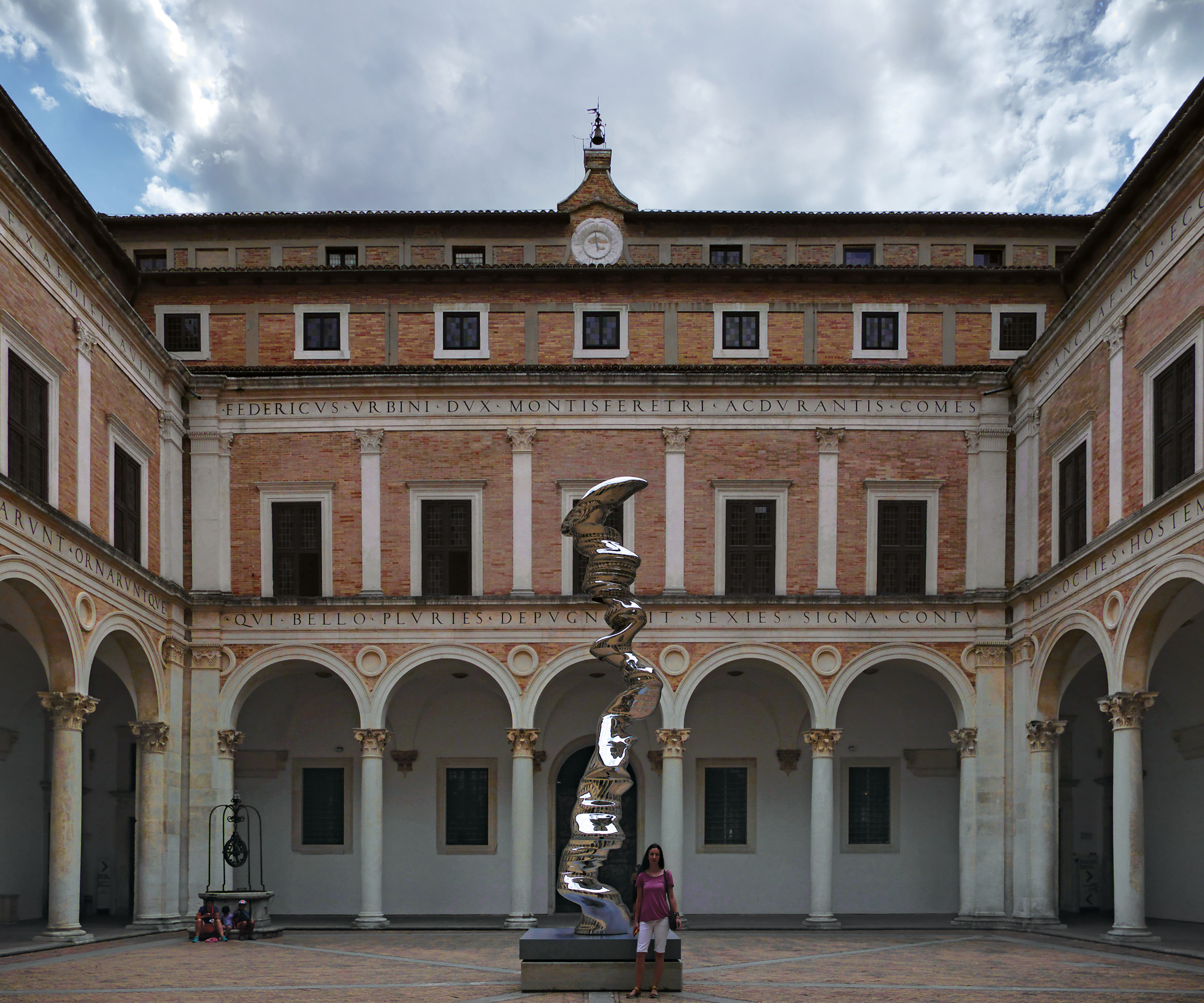 Атријум Војводске палате у Урбину